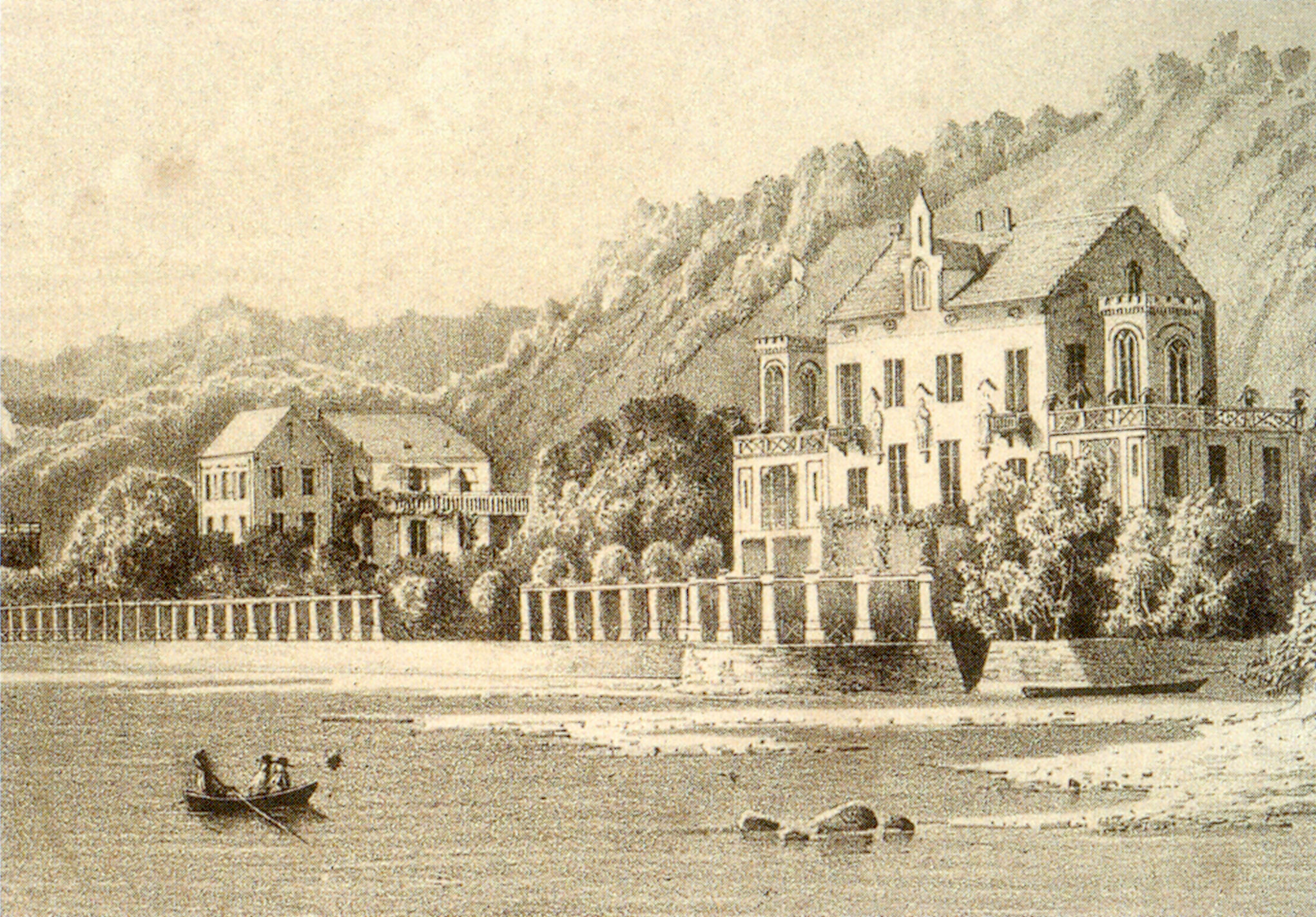 Villa Leuchtenberg in Lindau-Reutin aus der Sammelmappe "Lithgraphien vom Bodensee" von Julius Greth